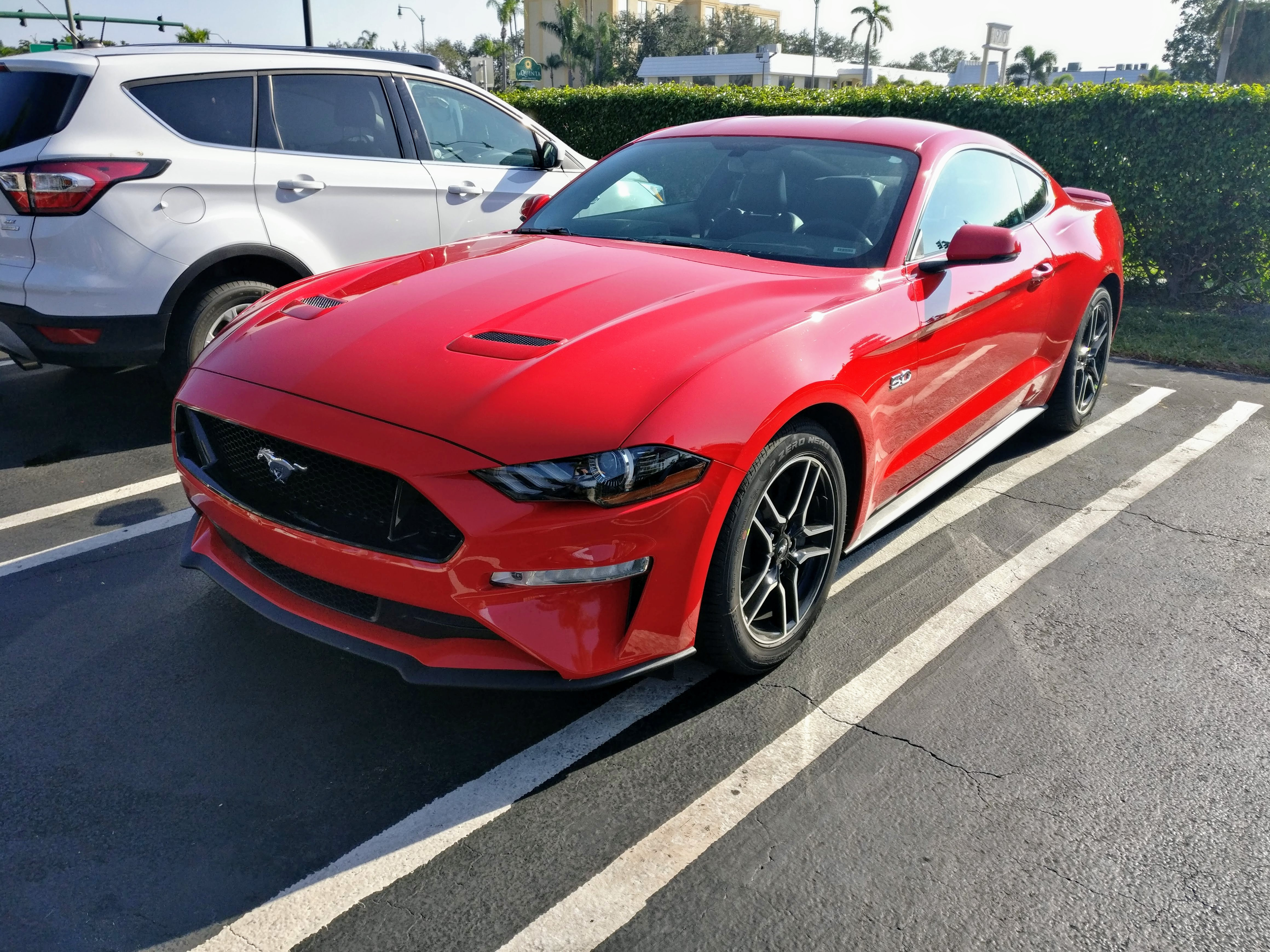 Форд Мустанг GT 2017 с 5 литровым двигателем